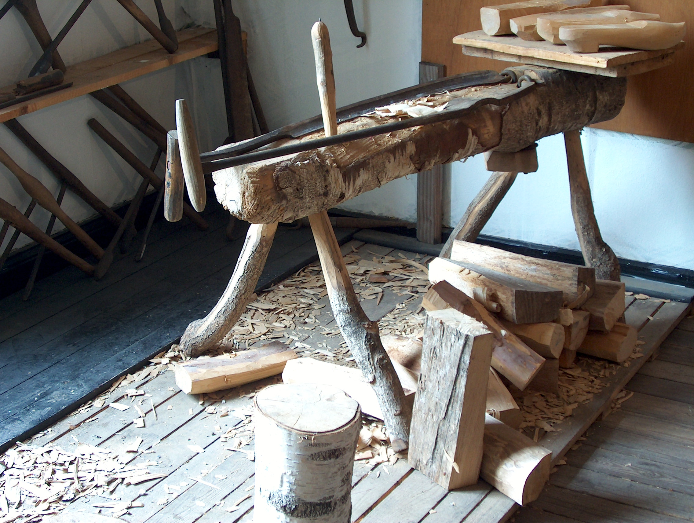 Plane ou paroir - Porcheresse en Ardenne, Belgique - musée du sabot